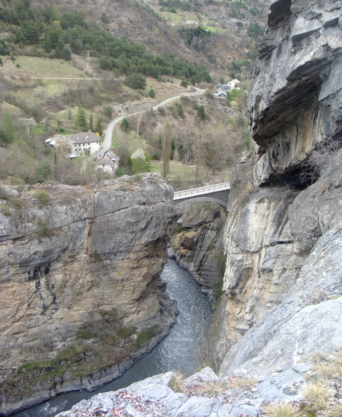 Défilé de l'Ubaye, en aval du Lauzet (Alpes de Haute-Provence). Au centre, viaduc prévu pour la ligne de l'Ubaye, non mis en service.